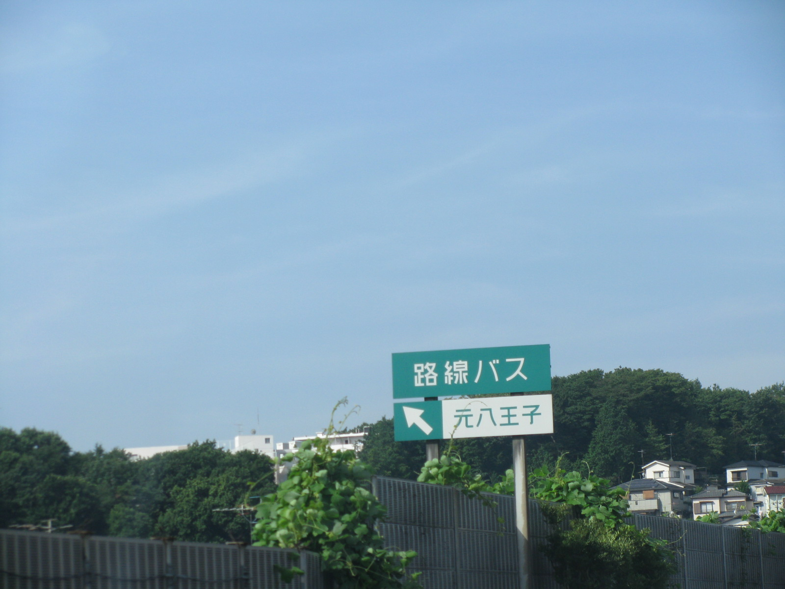 元八王子バスストップ 2008年8月15日、中央道下り元八王子バス停付近で撮影